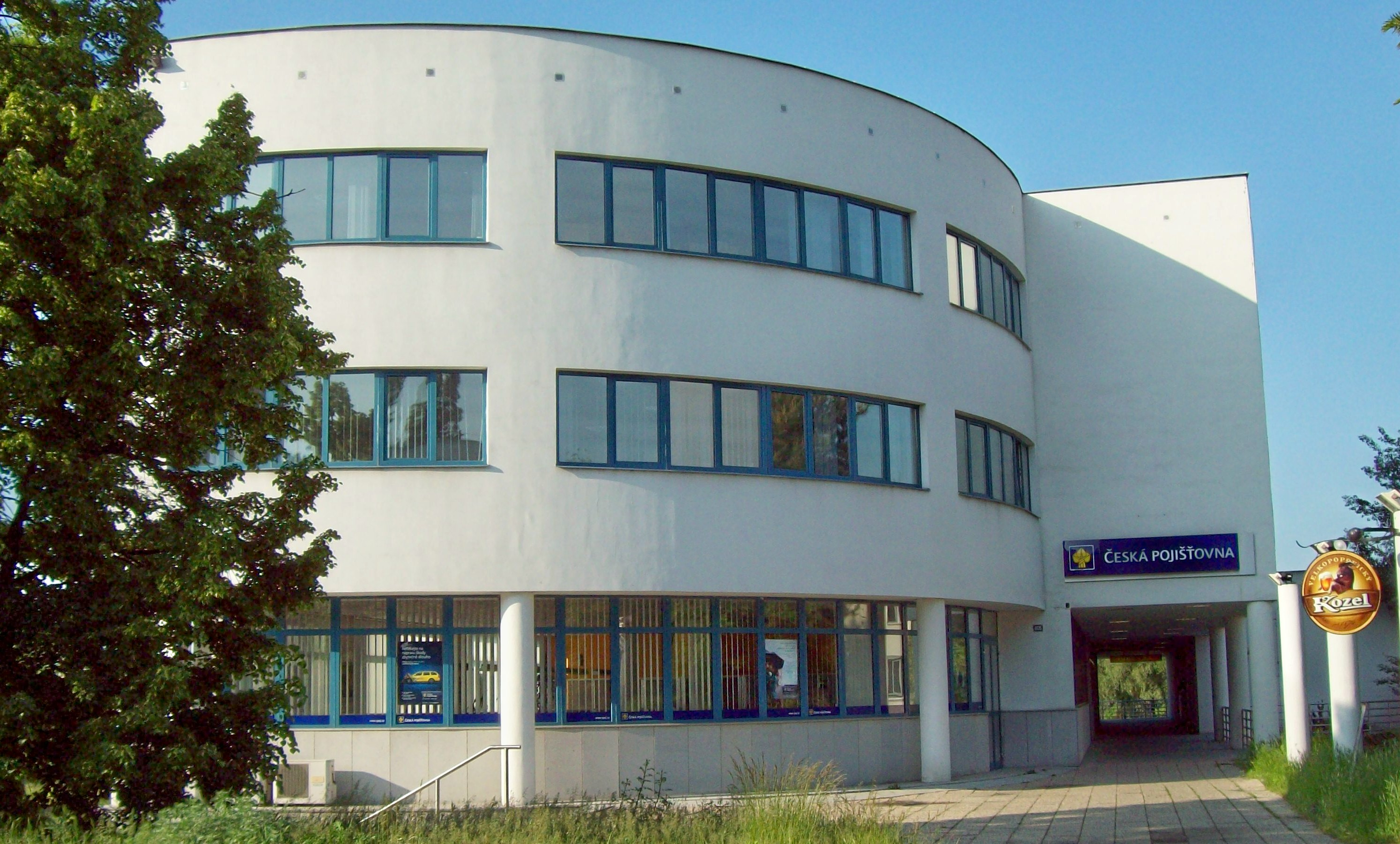 Česká pojišťovna Mělník, ul. Bezručova 605 .